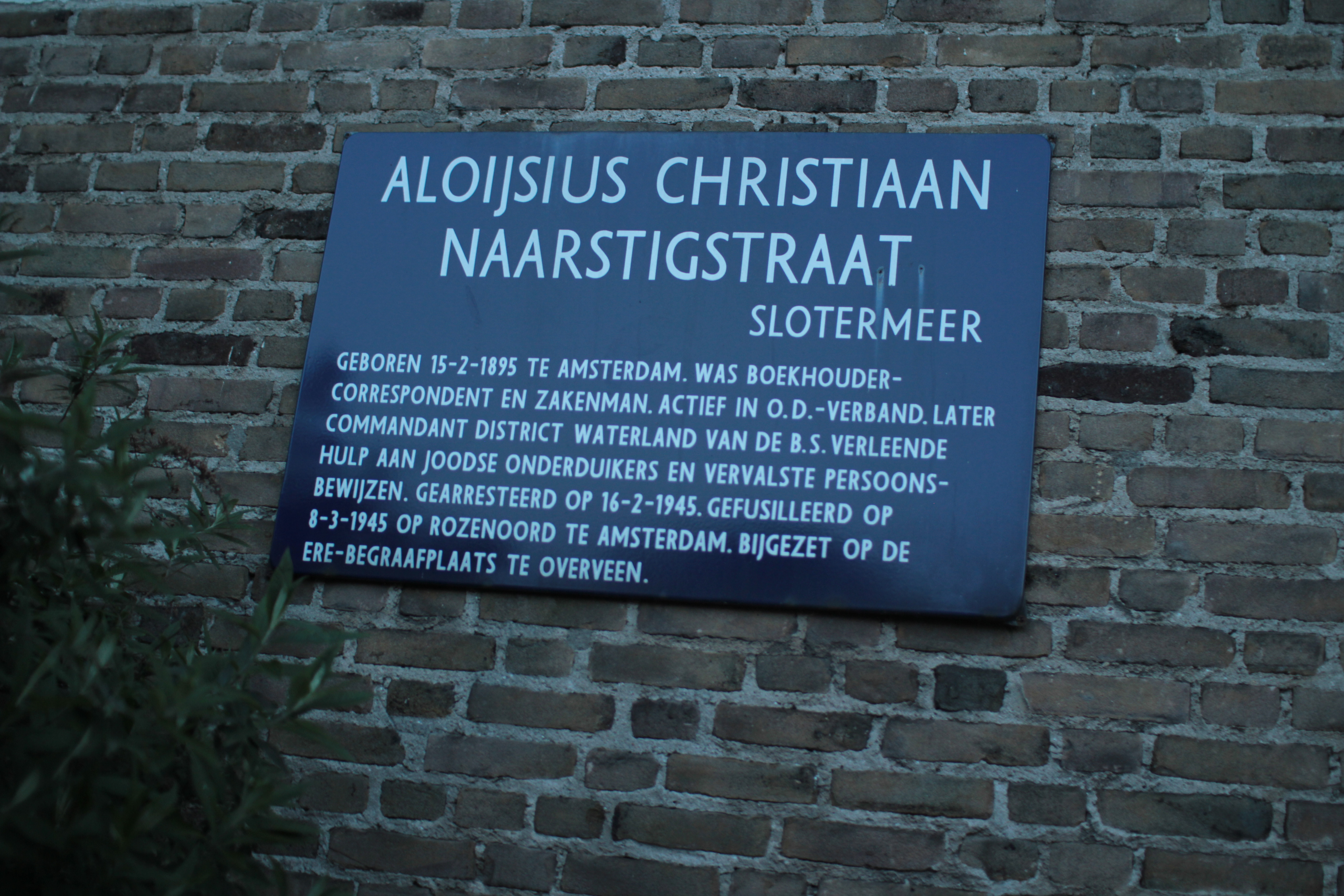 Straatnaambordje van de Aloijsus Christiaan Naarstigstraat te Amsterdam